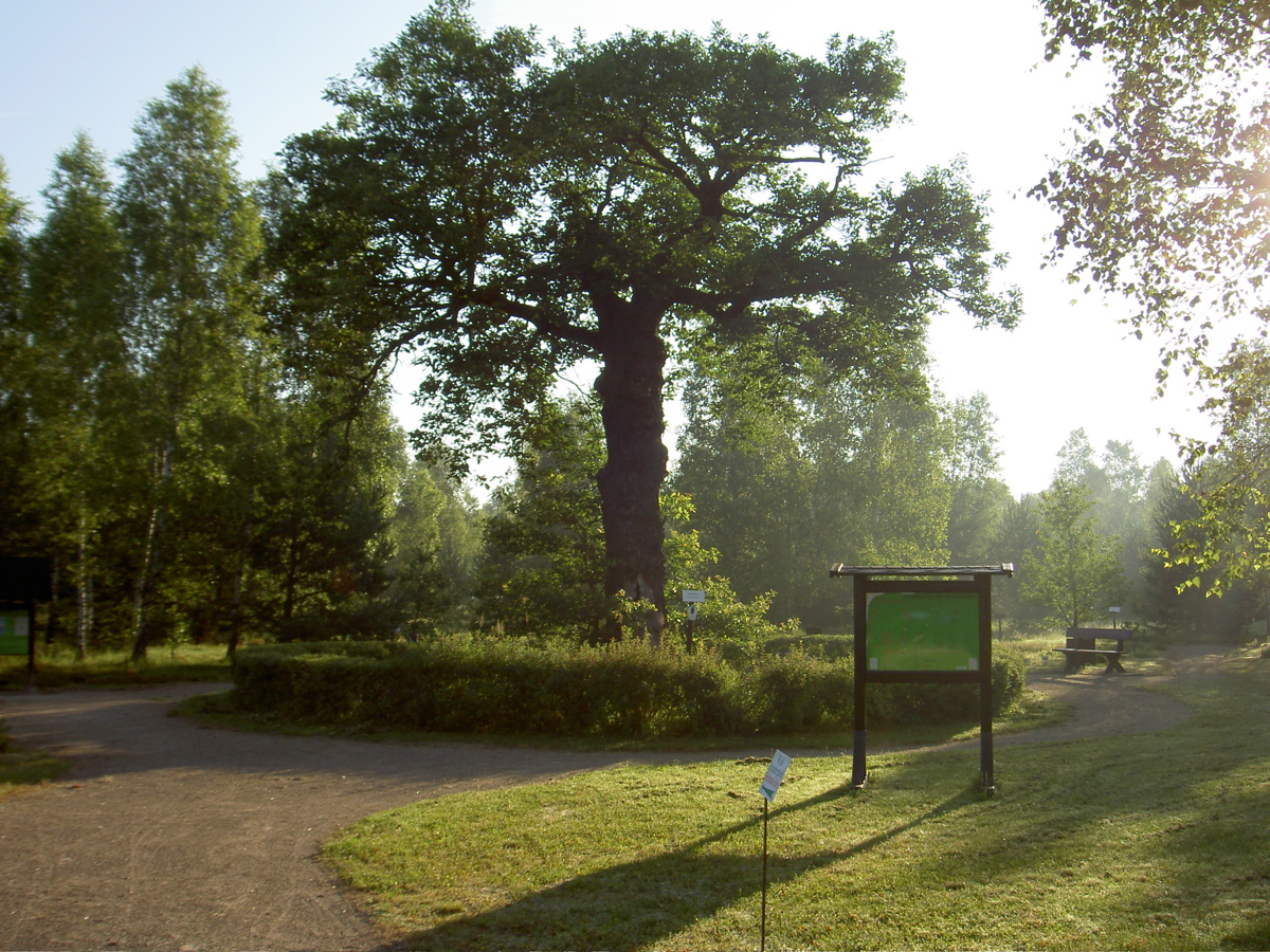 Heimateiche, Glücksburger Heide